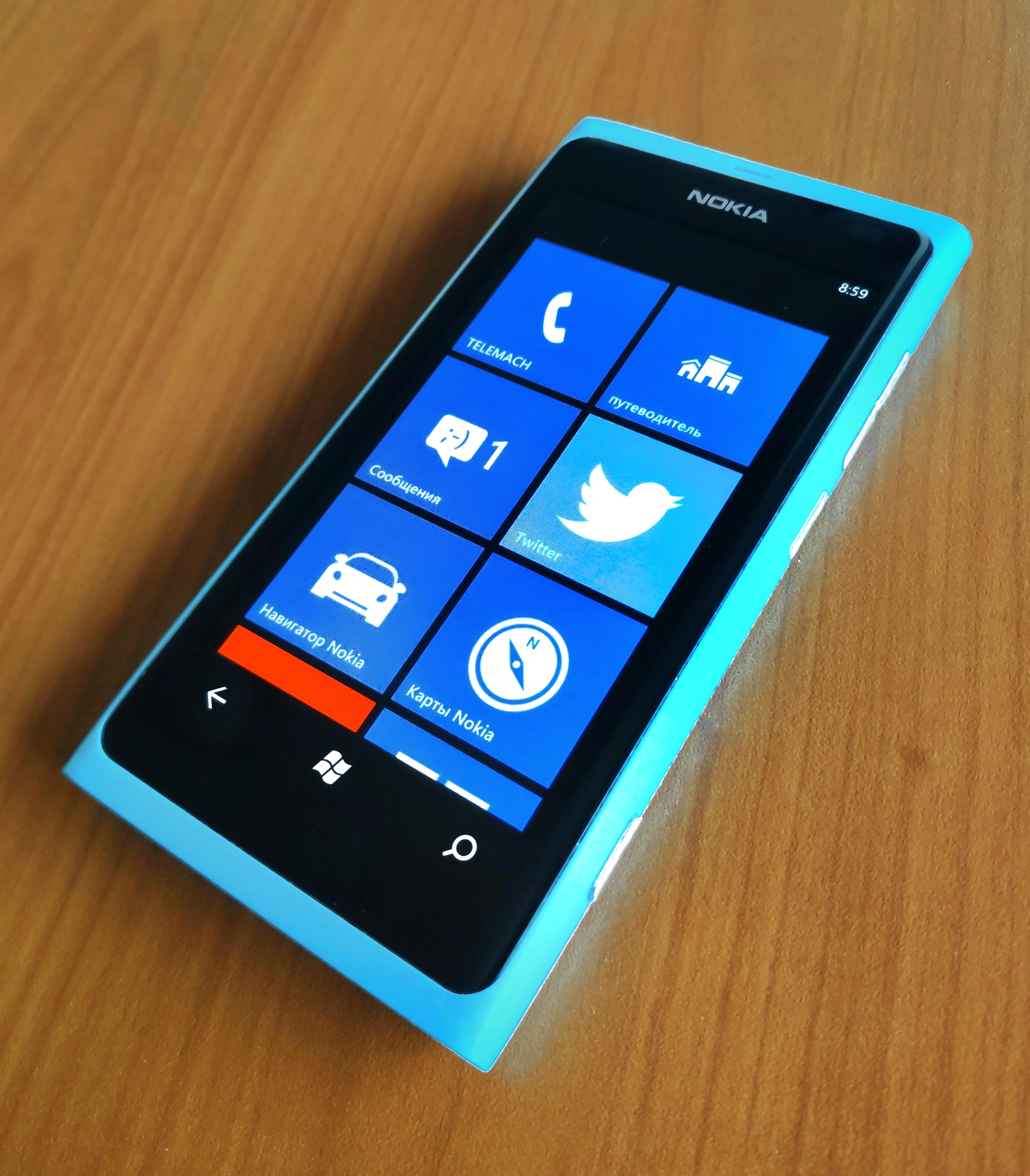 Nokia Lumia 800